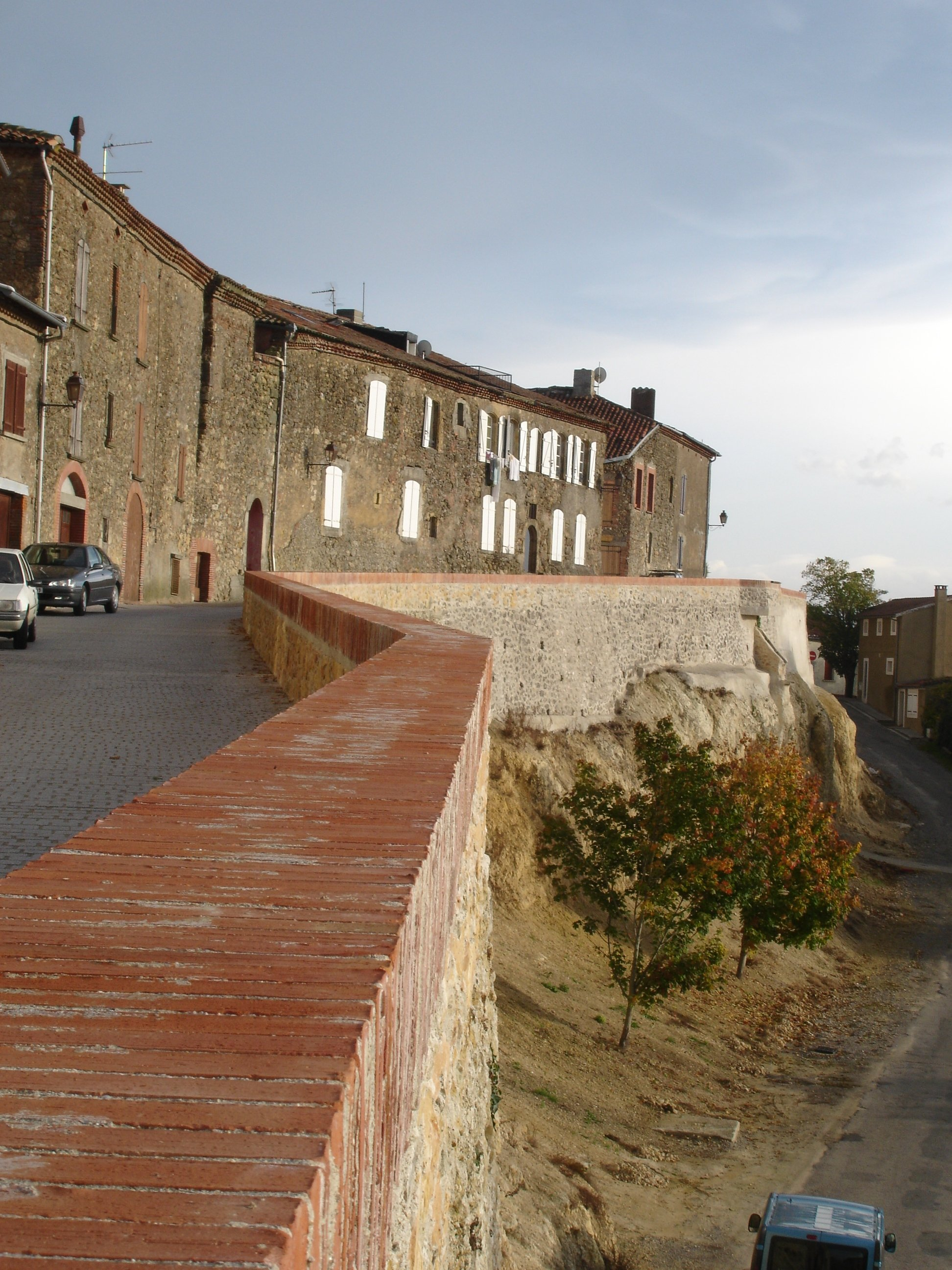 France - Ariège (09) - Carla-Bayle - Remparts